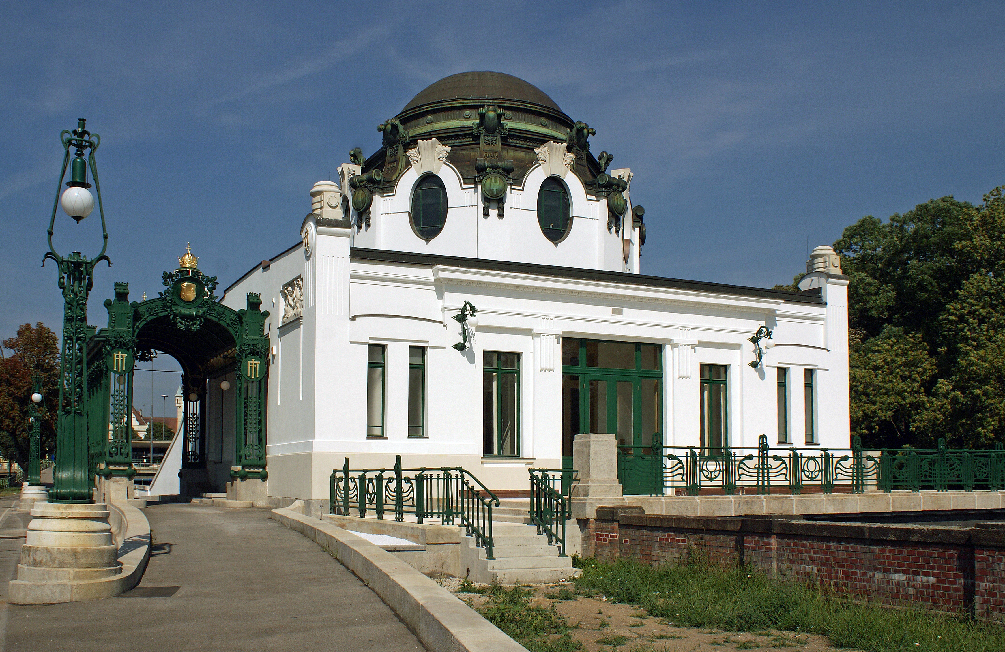 Otto Wagner Hofpavillon Hietzing Dieses Bild wurde anlässlich des österreichischen Tags des Denkmals 2014 in Wien eingereicht.